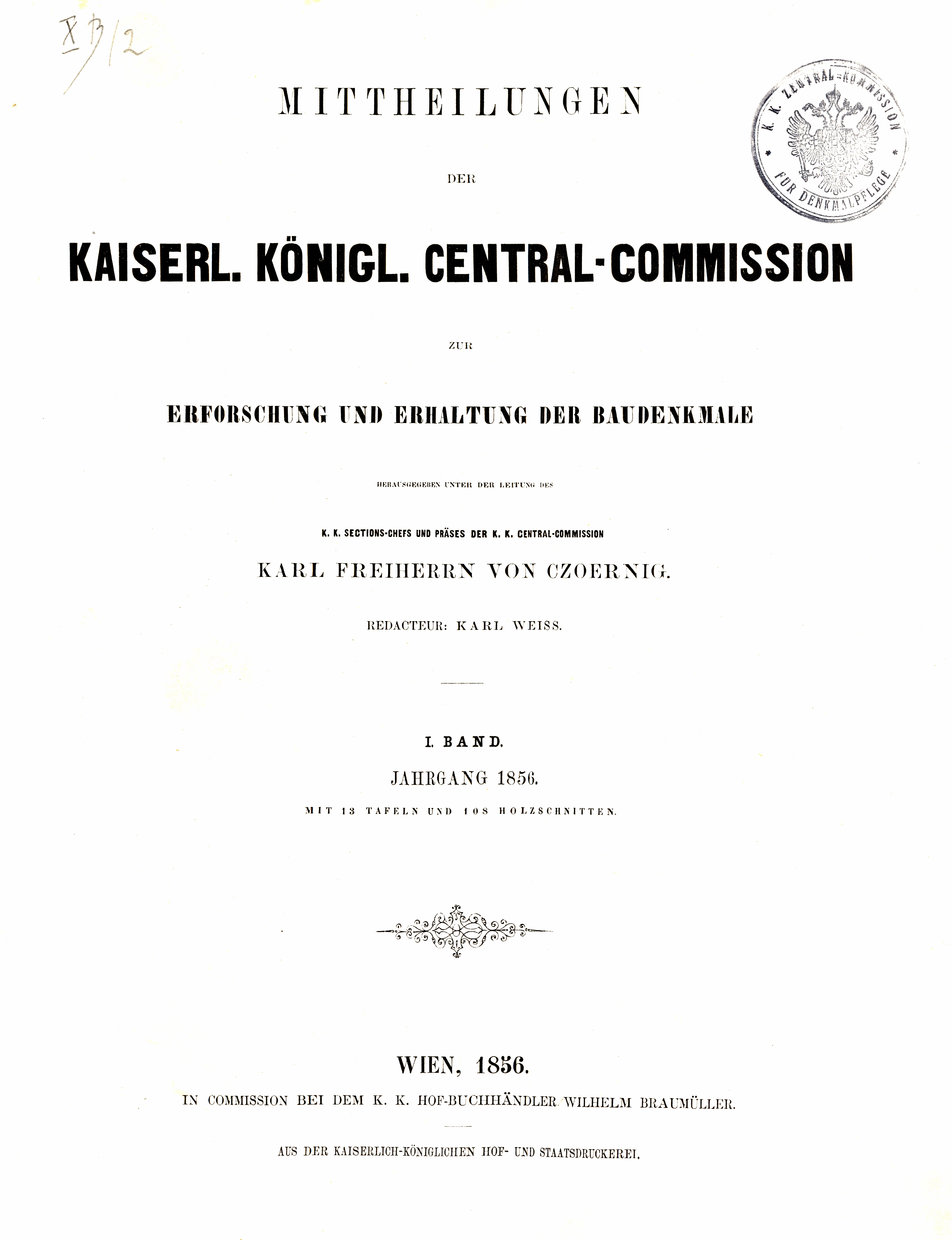 Titelblatt des ersten Jahrganges der Mittheilungen der k.k. Central-Commission